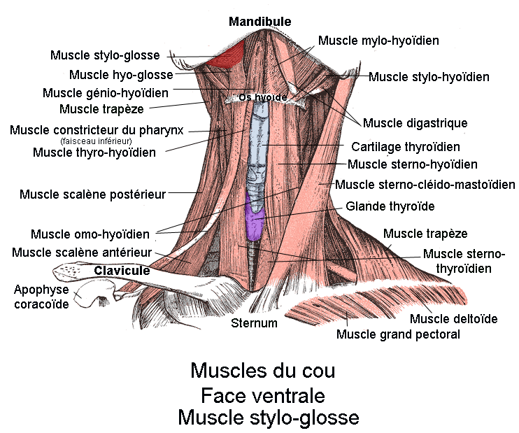 Muscle stylo-glosse. Vue antérieure